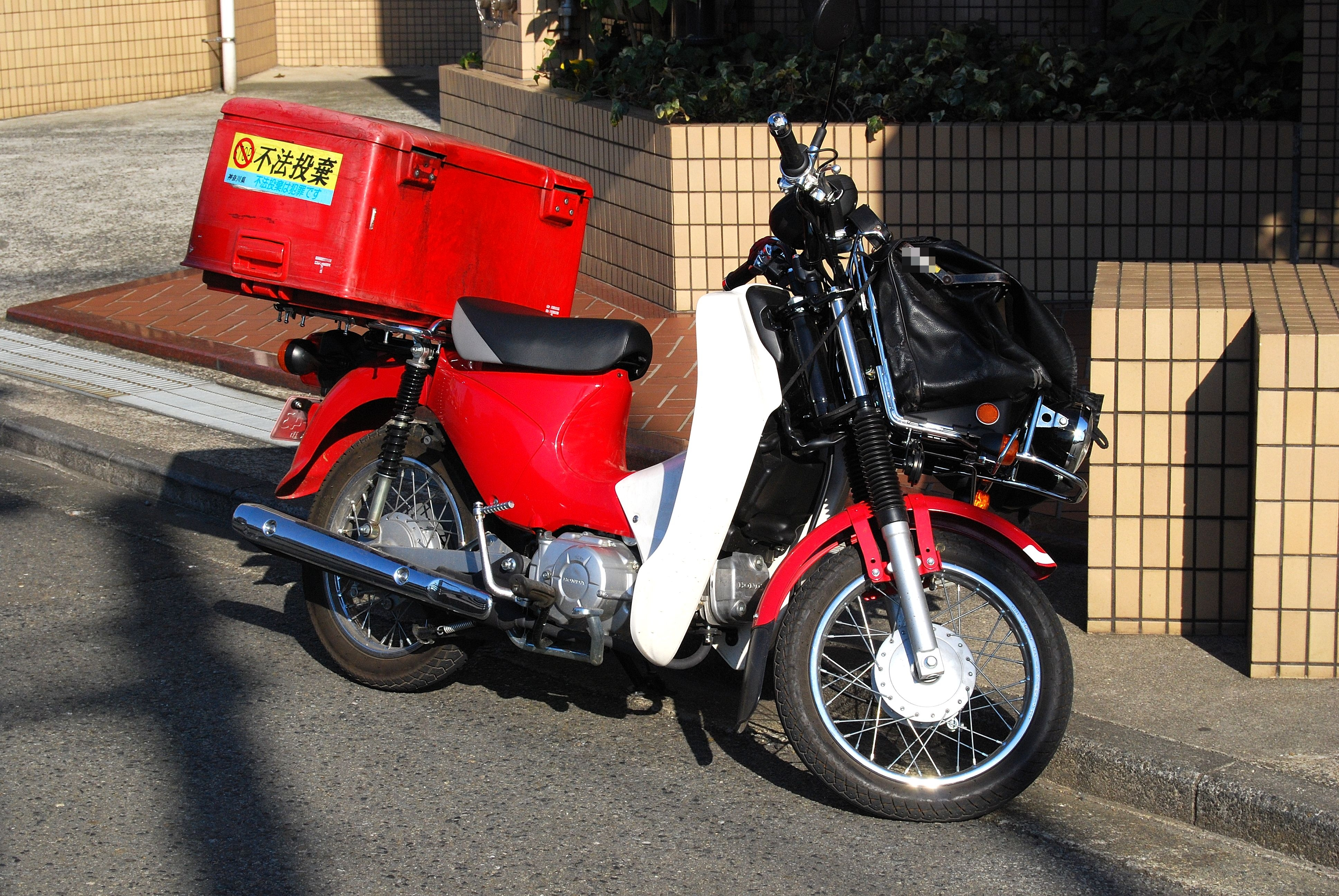 日本郵政スーパーカブ110MD